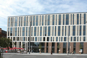 Das Gebäude der Mannheimer Abendakademie und Volkshochschule GmbH in U 1, 16-19, Mannheim